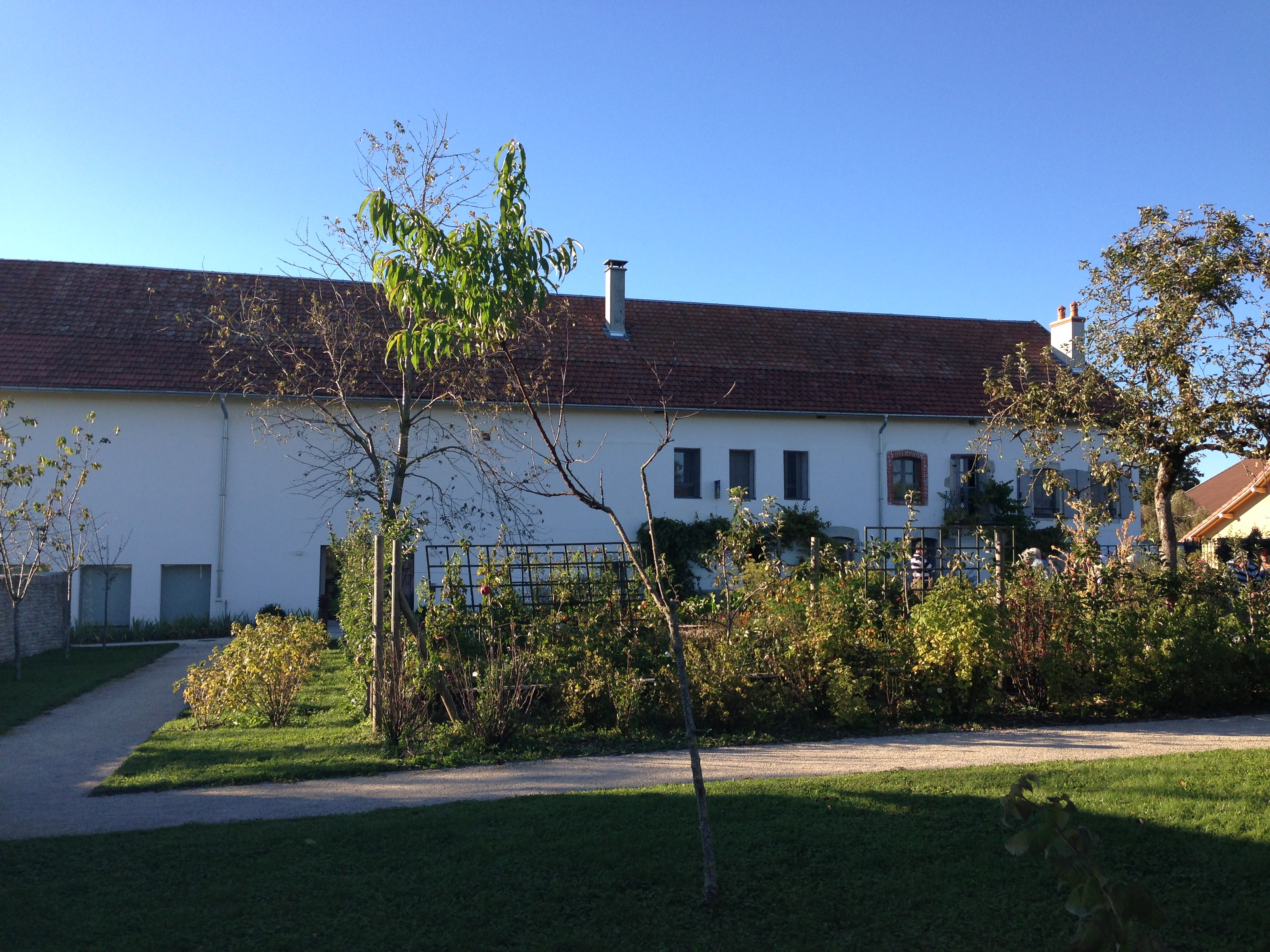 La ferme de la famille Courbet à Flagey (Doubs)